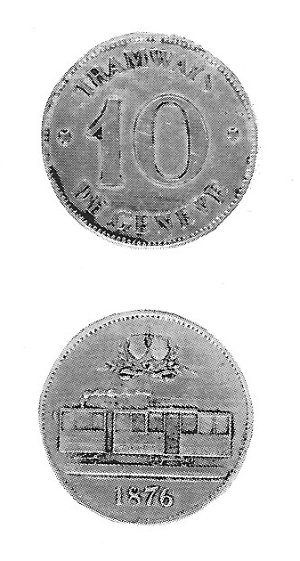 Jetons de 10 centimes des Tramways de Genève